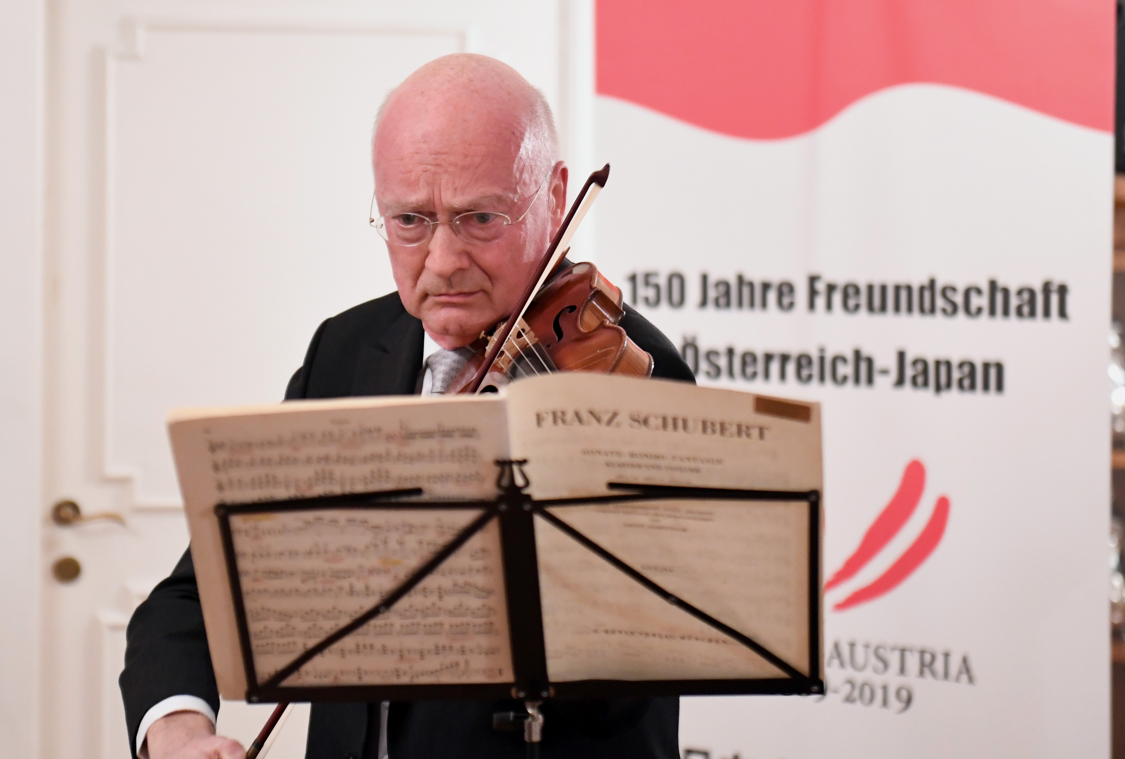 Wien am 23. Jänner 2019, Eröffnungsveranstaltung aus Anlass des Jubiläumsjahres "150 Jahre Freundschaft Österreich-Japan" Foto: Mahmoud